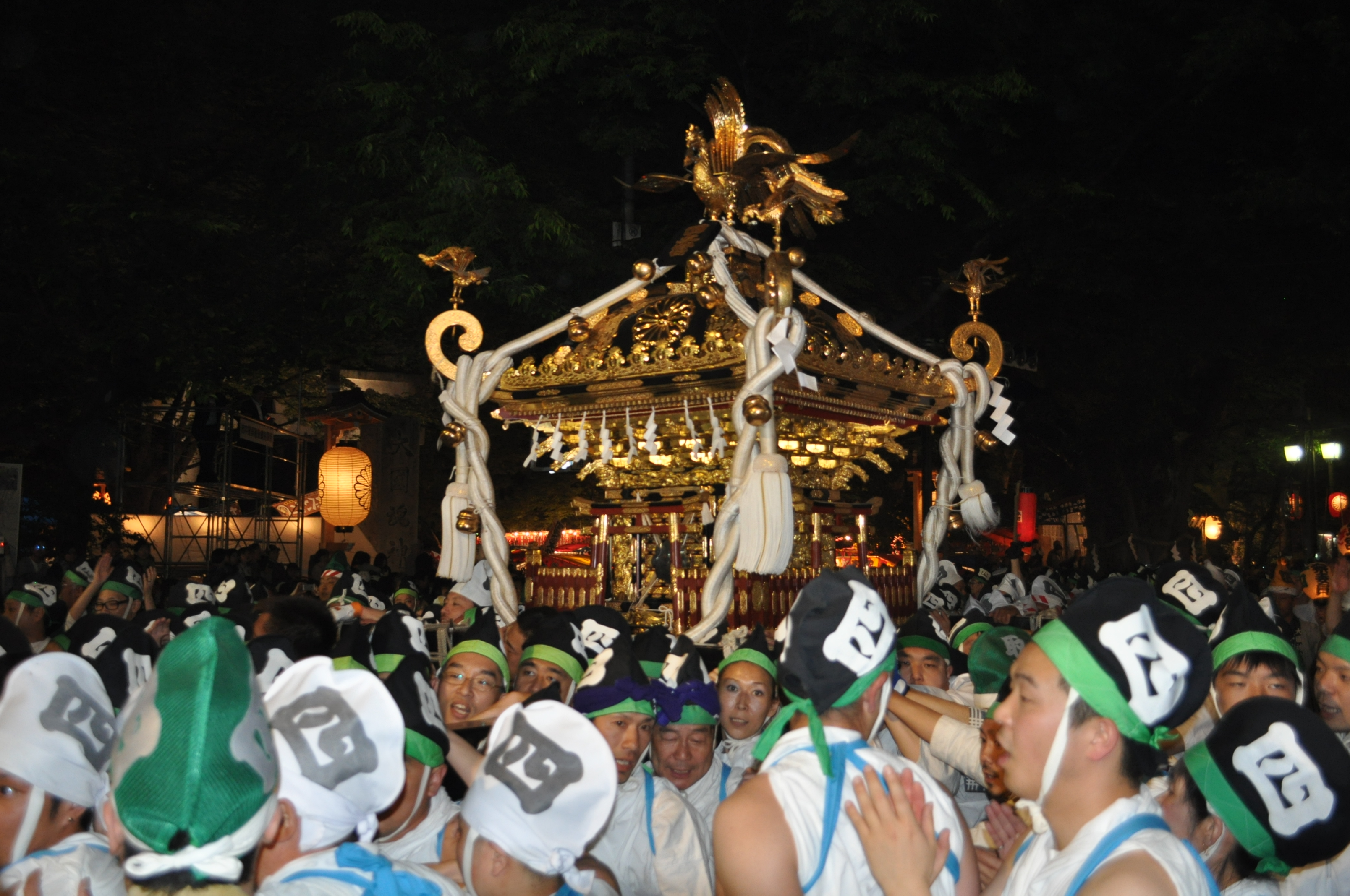 くらやみ祭の神輿渡御